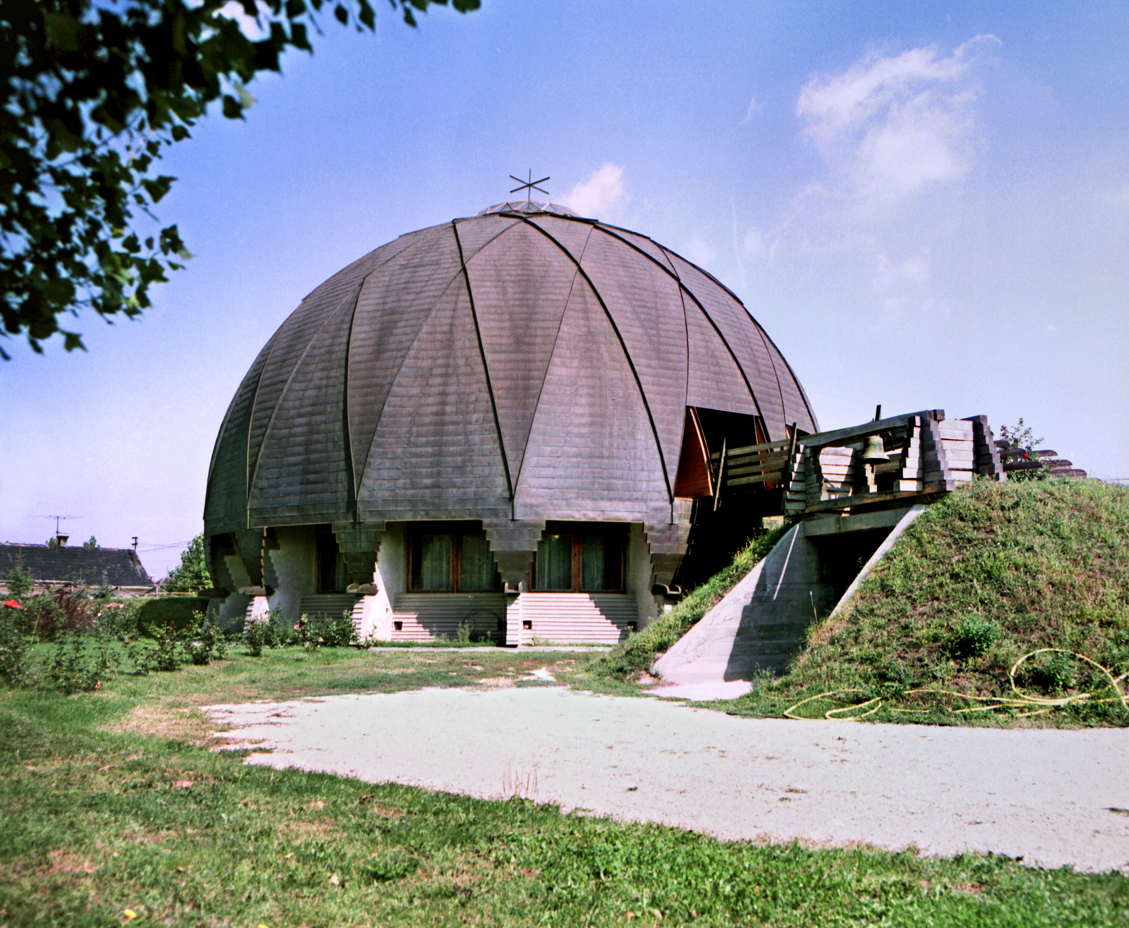 01.09.1986 Halásztelek auf der Insel Csepel (Ungarn). Kirche von György Csete (1981) [PLEA 86 - R19860831F]19860901120NR(c)Blobelt